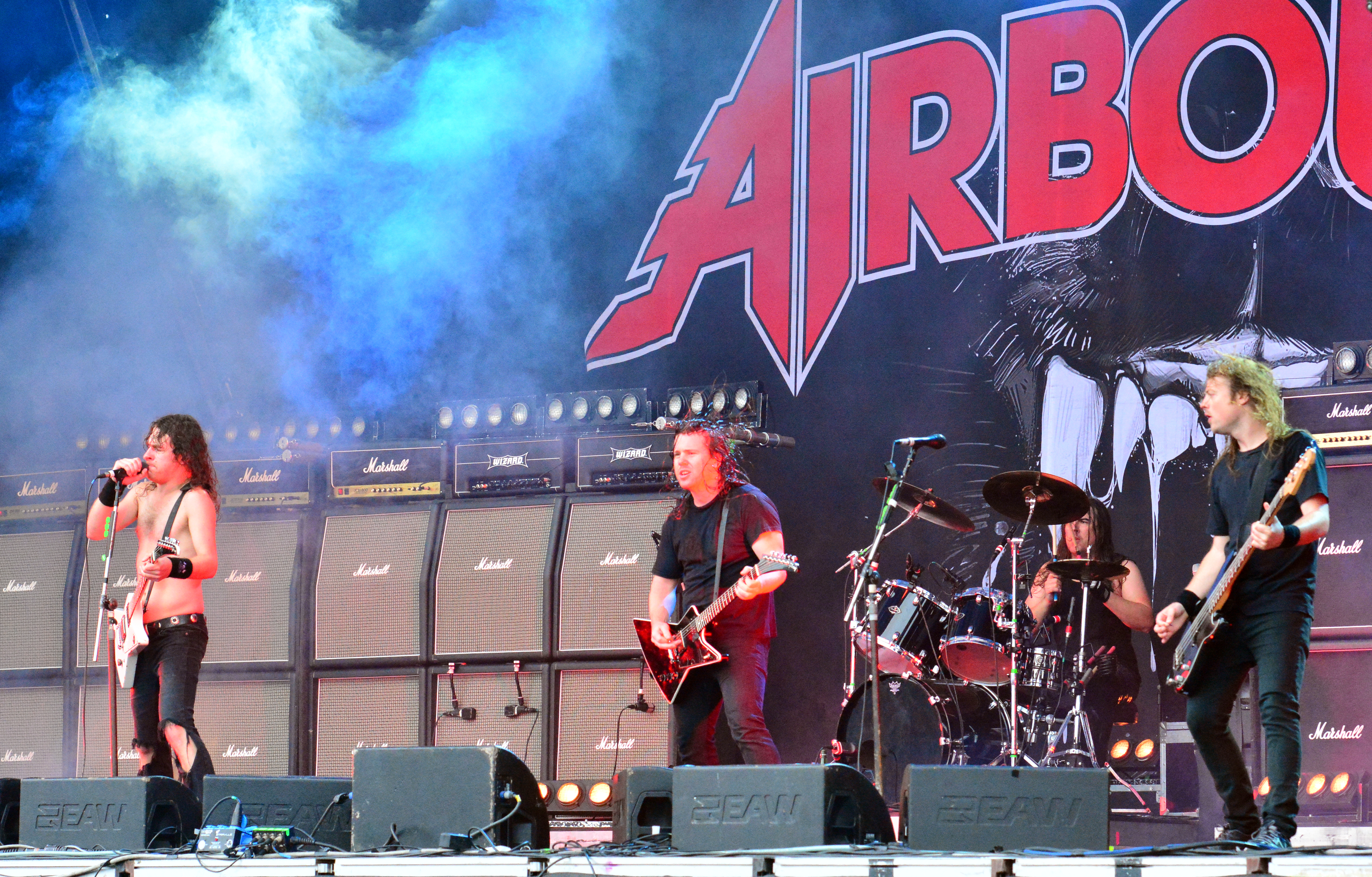 Airbourne beim Elbriot 2014